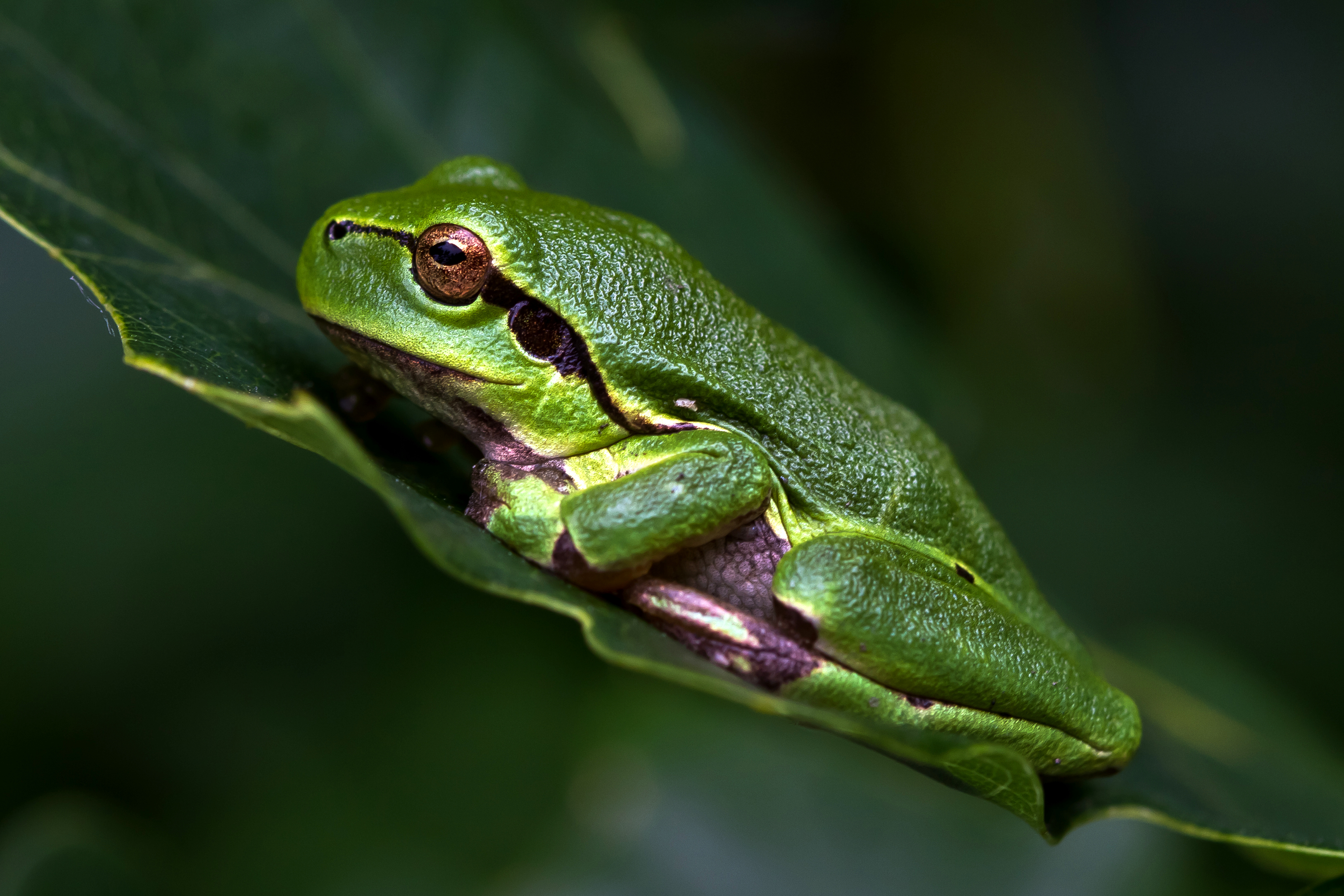 Sachsen, Eichblatt, ca. 60 Meter vom Teich entfernt: Laubfrosch